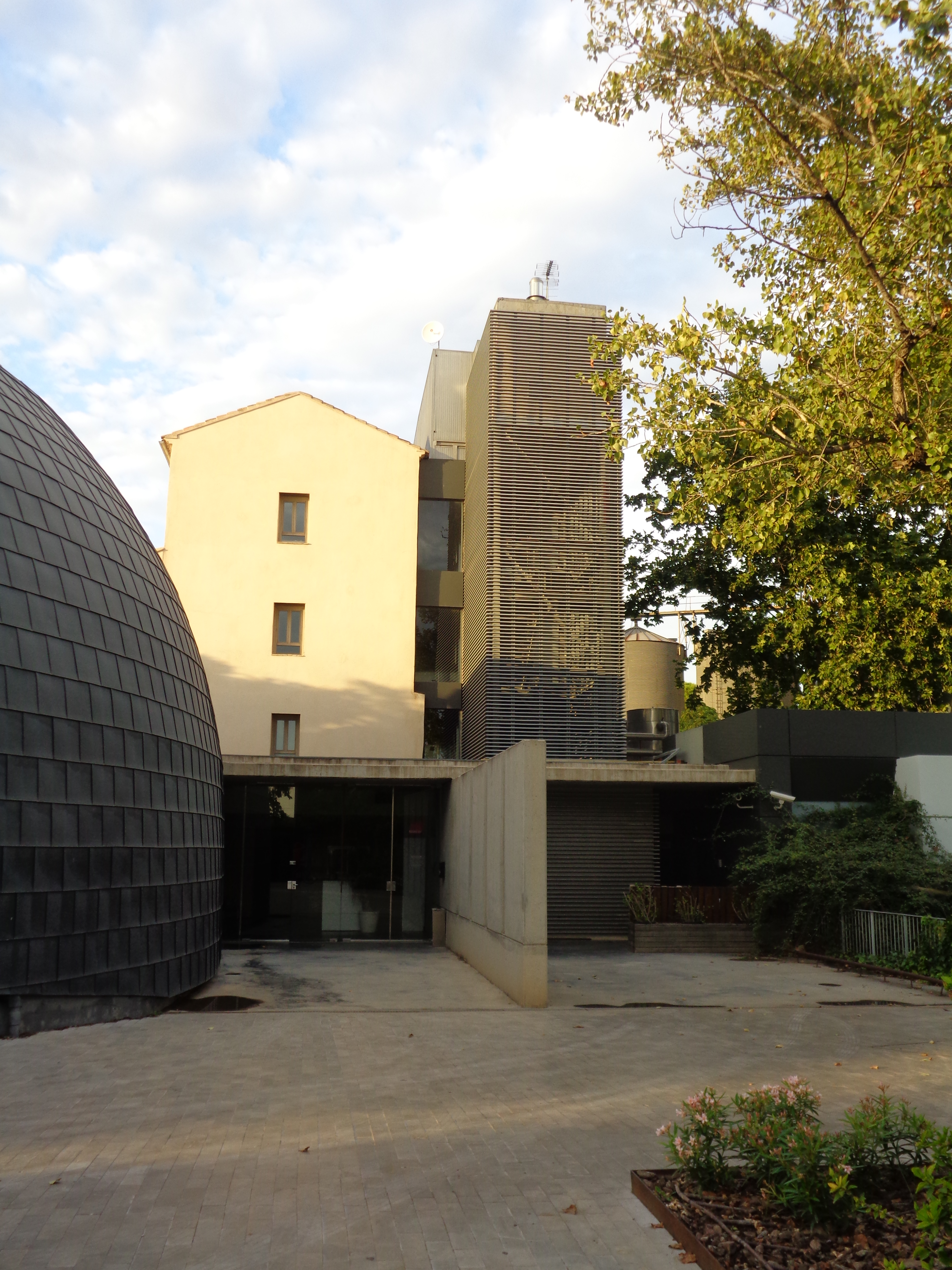 Paterna.